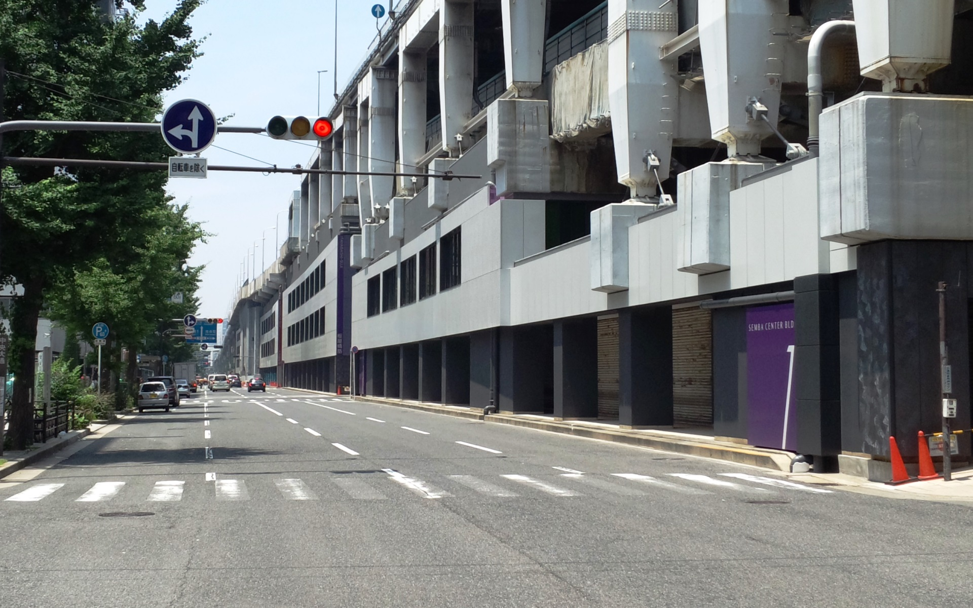 中央区役所前より船場センタービル1号館